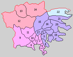 岩手県気仙郡の町村。